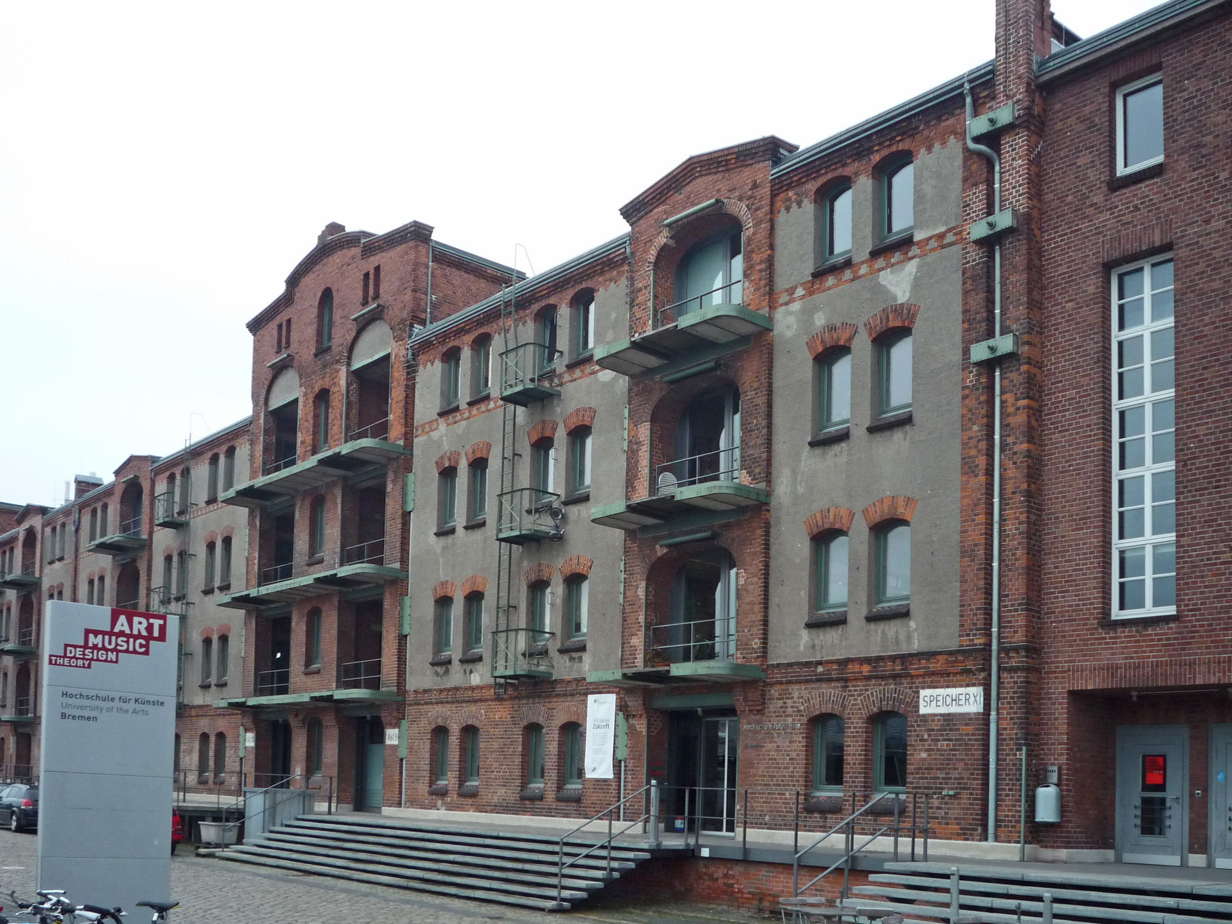 Hochschule für Künste Bremen im Speicher XI, Am Speicher XI 1, 2, 3, 4, 5, 6, 7, 8 / Eduard-Suling-Straße.Das abgebildete Objekt ist ein geschütztes Kulturdenkmal in der Freien Hansestadt Bremen, mit der Nr. 0324 beim Landesamt für Denkmalpflege registriert.